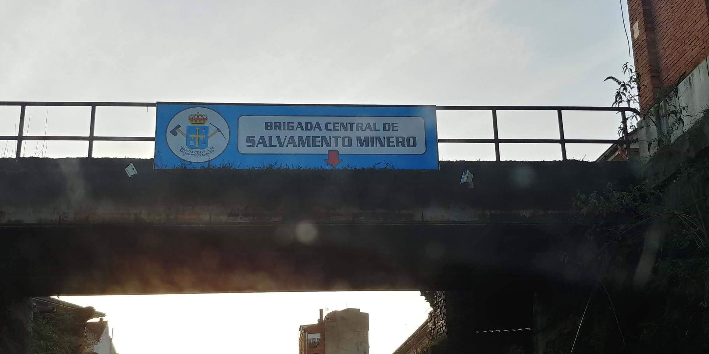 Brigada Central de Salvamento Minero en Sama de Langreo.